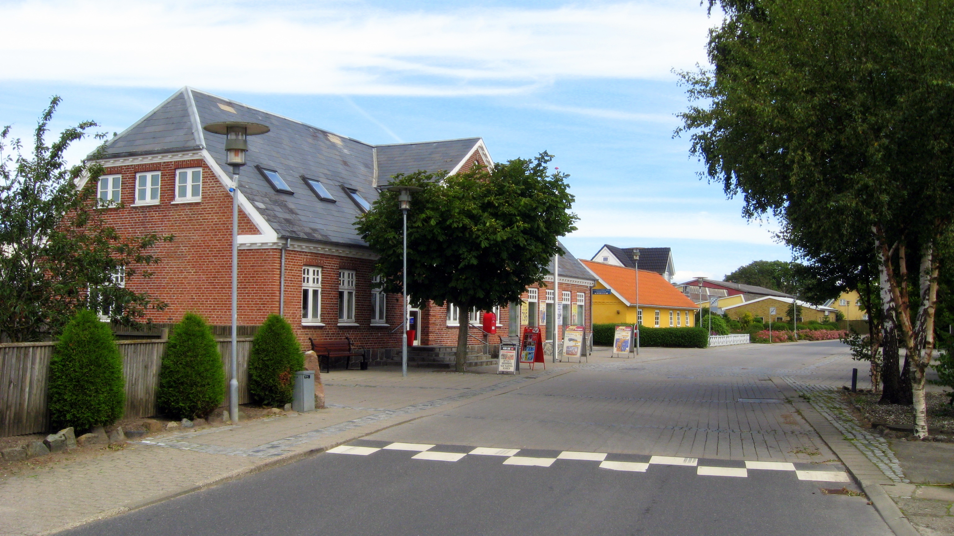 Gjøl, Jammerbugt Kommune